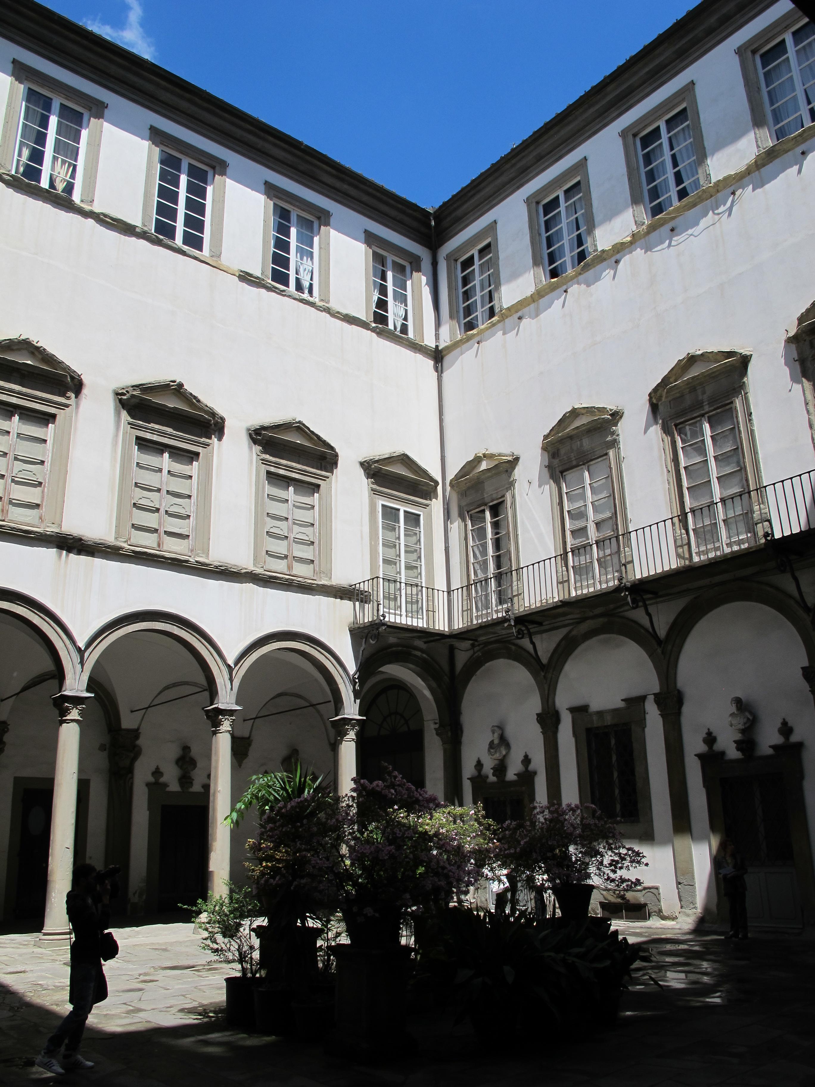 Palazzo del pugliese, cortile m